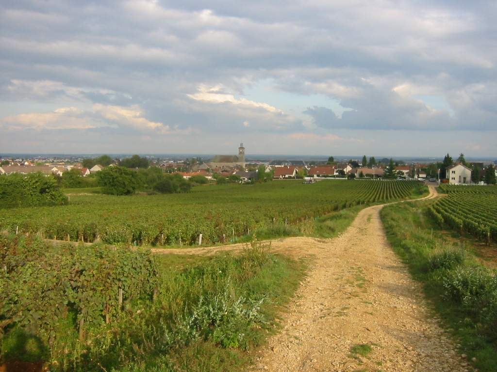 Chemin de vigne Marsannay la Cote Bourgogne